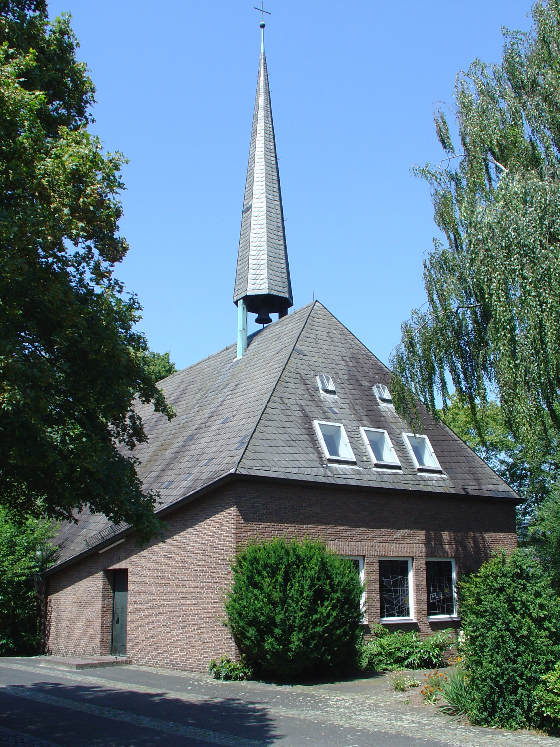 Evangelische Christuskirche in Marienfeld